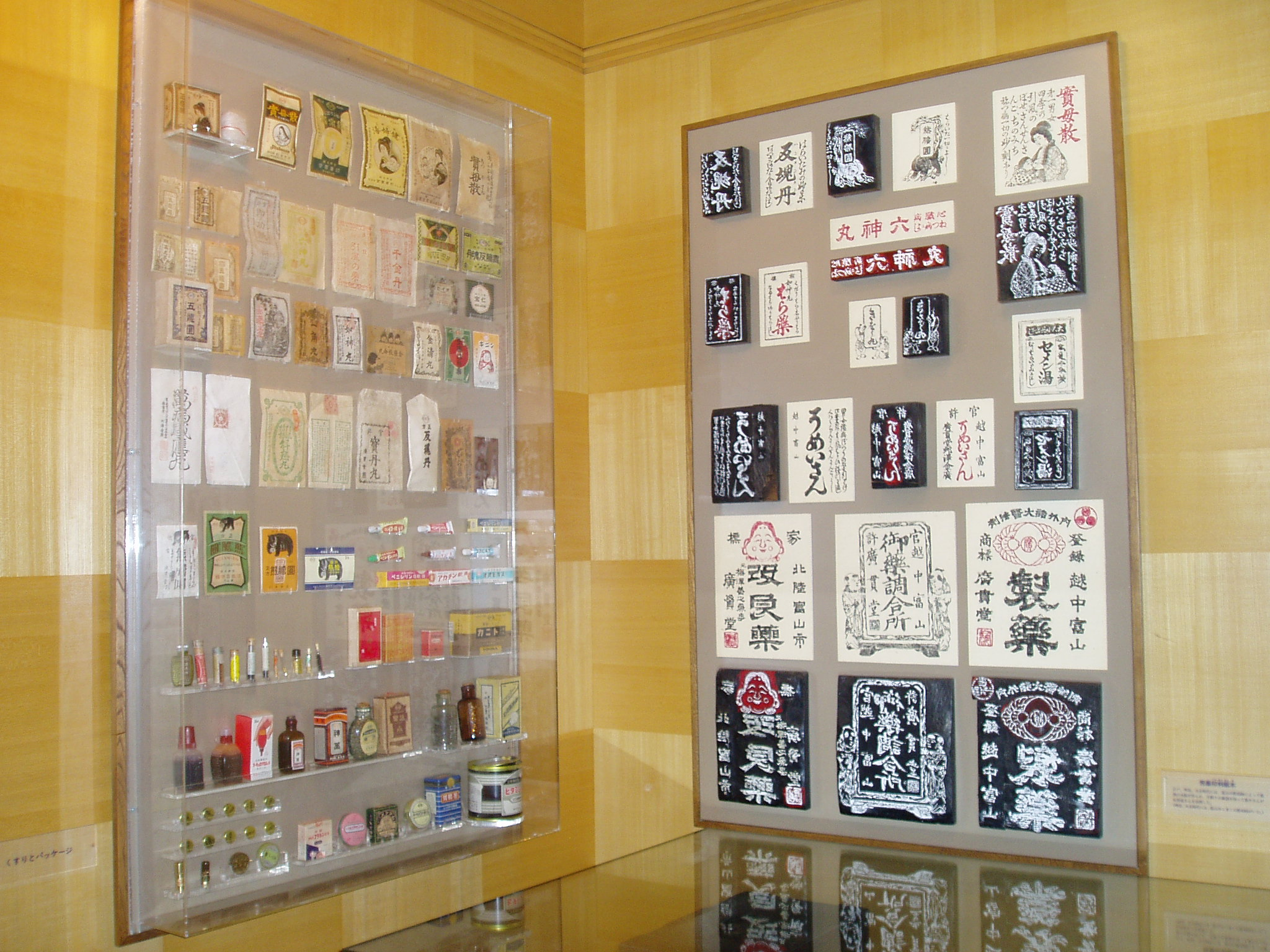 富山市に本社がある広貫堂の薬の展示場